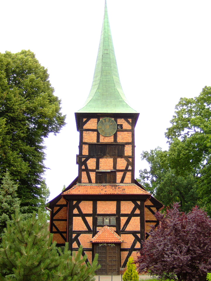 Fachwerkkirche in Stegna (Polen)